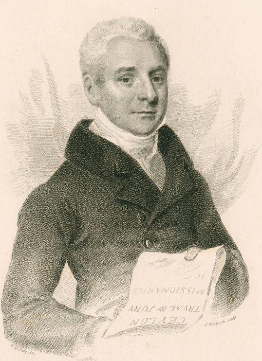 Sir Alexander Johnston (1775–1849)